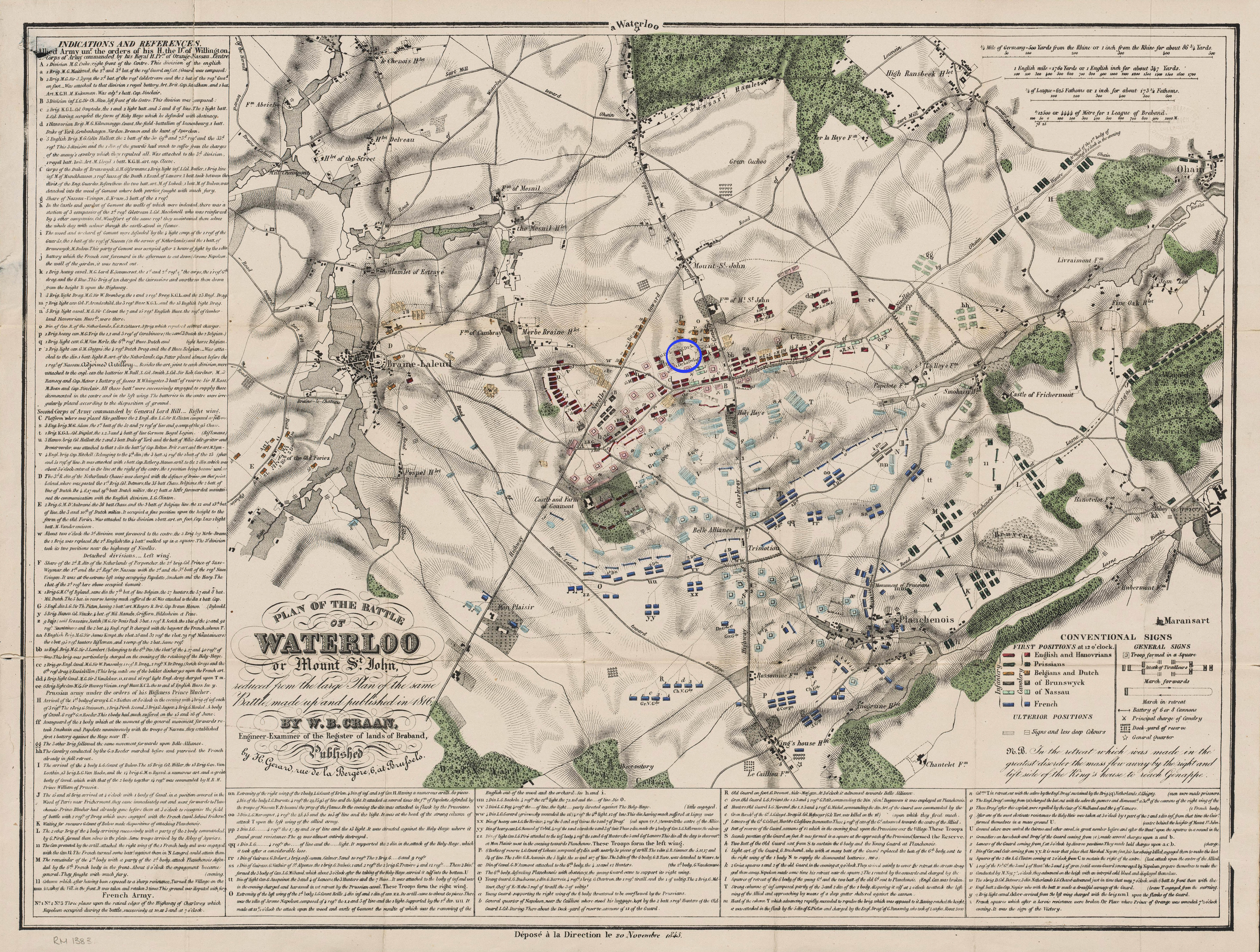 Map of the battle of waterloo by W. B. Craan (1845) showing the position of the 3rd Cavalry Brigade of General Major Wilhelm von Dörnberg